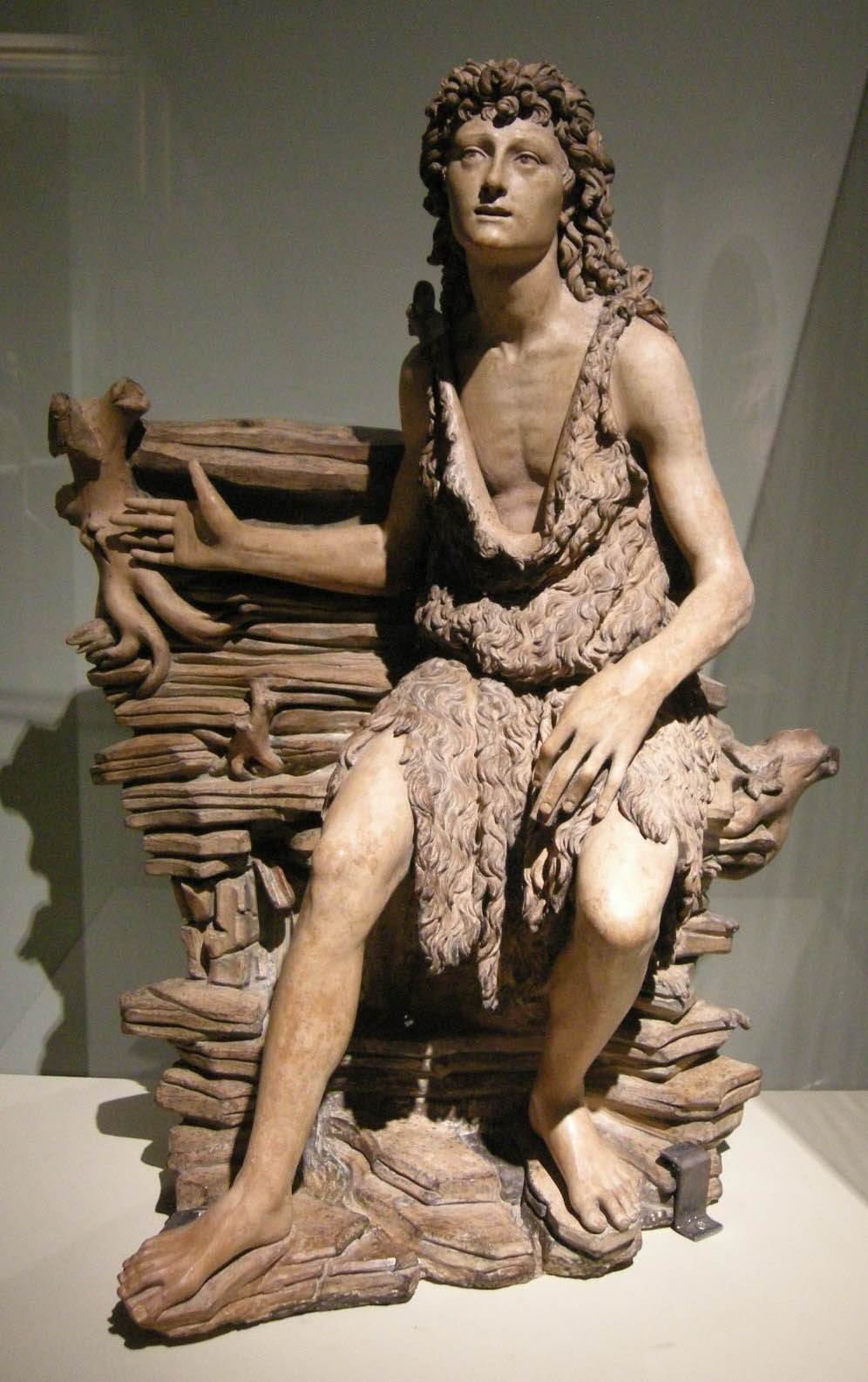 Maestro del san giovannino, san giovannino nel deserto, 1505-1507 circa